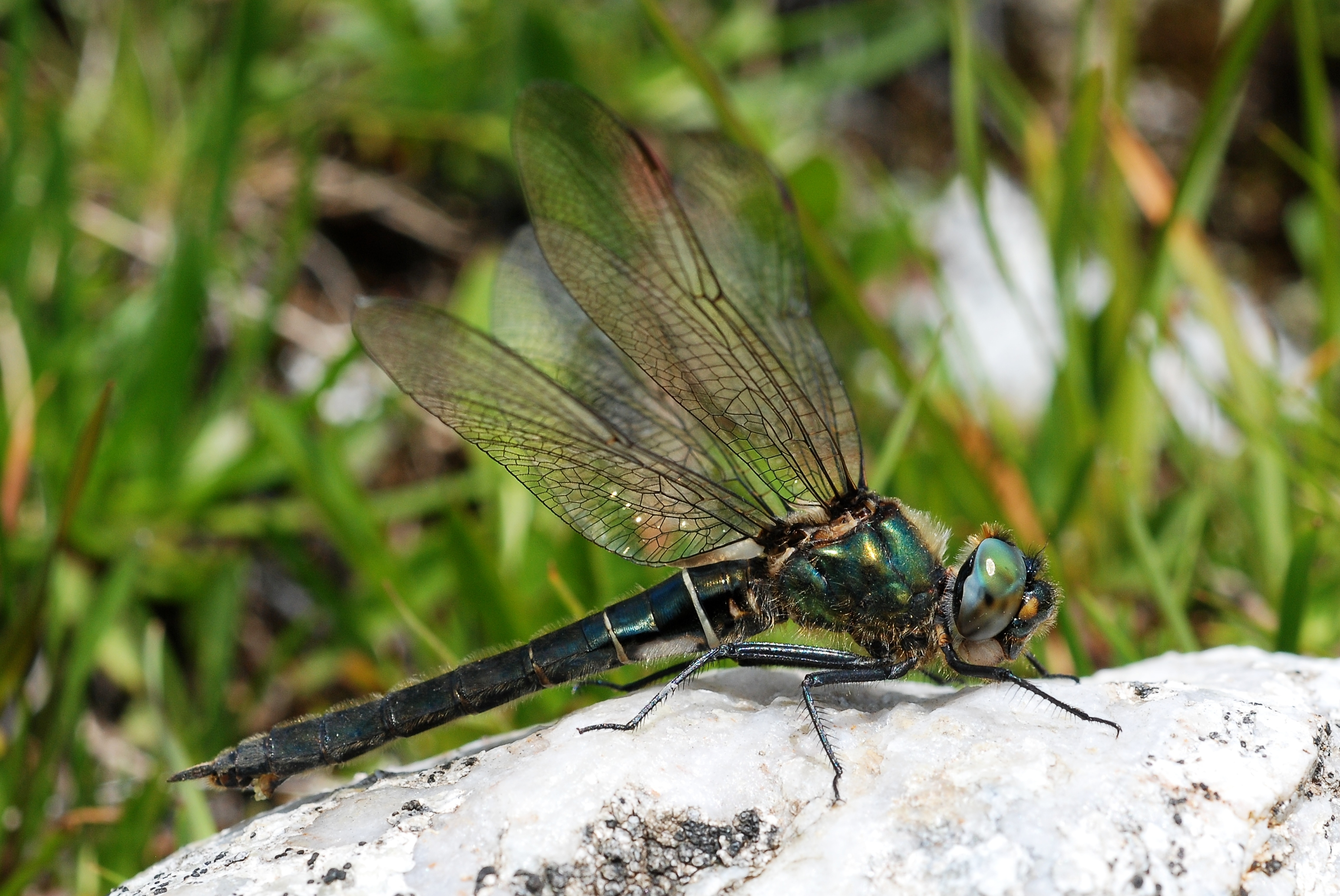 Somatochlora alpestris, Vanoise National park, France